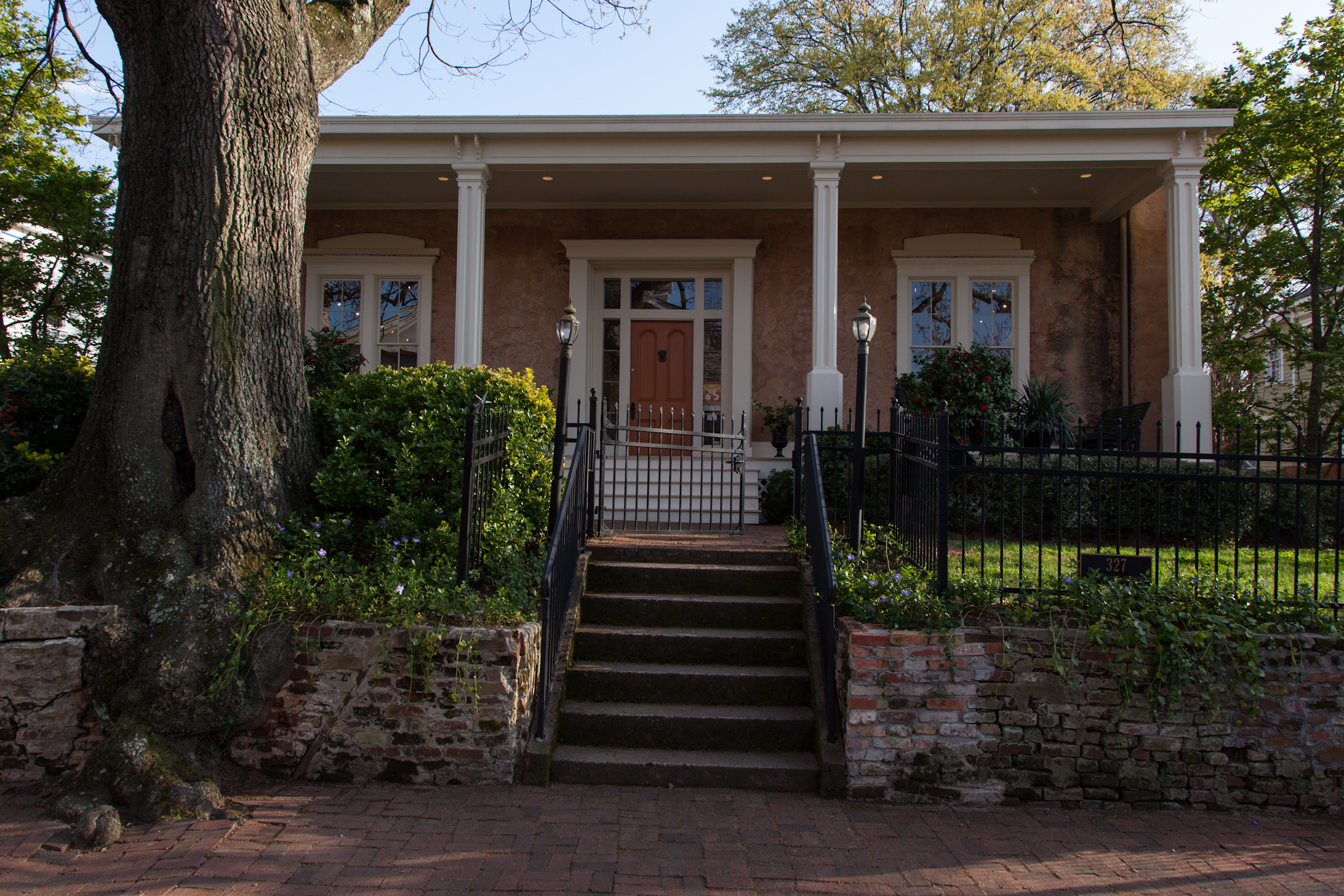 L.P. Grant Mansion, Atlanta